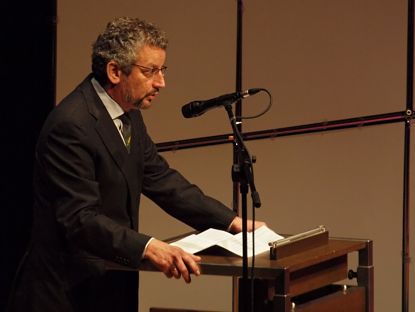 Prof. Alexander Karmann (TU Dresden) spricht auf dem Absolventenball der Fakultät WiWi 2009